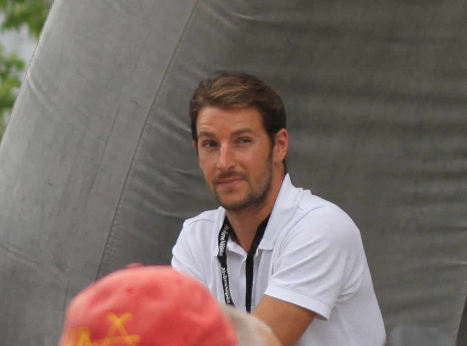 David Smétanine sur le Podium d'arrivée de la 5e étape du Critérium du Dauphiné 2010